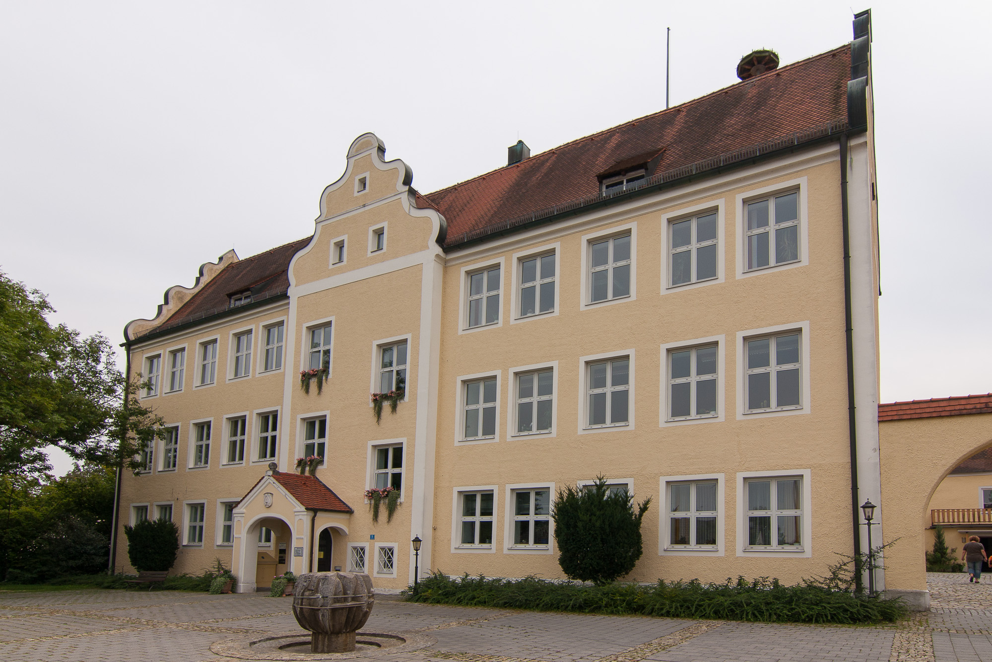 Ehem. Schulhaus; stattlicher Satteldachbau mit vier Zwerchgiebeln, 1903; Untergeschosse und Keller im Kern vom ehem. kurfürstlichen Schloss des 17. Jahrhunderts. Rest der Schlossbefestigung mit 2 Schalentürmen (einer jetzt Kapelle), spätmittelalterlich.This is a photograph of an architectural monument.